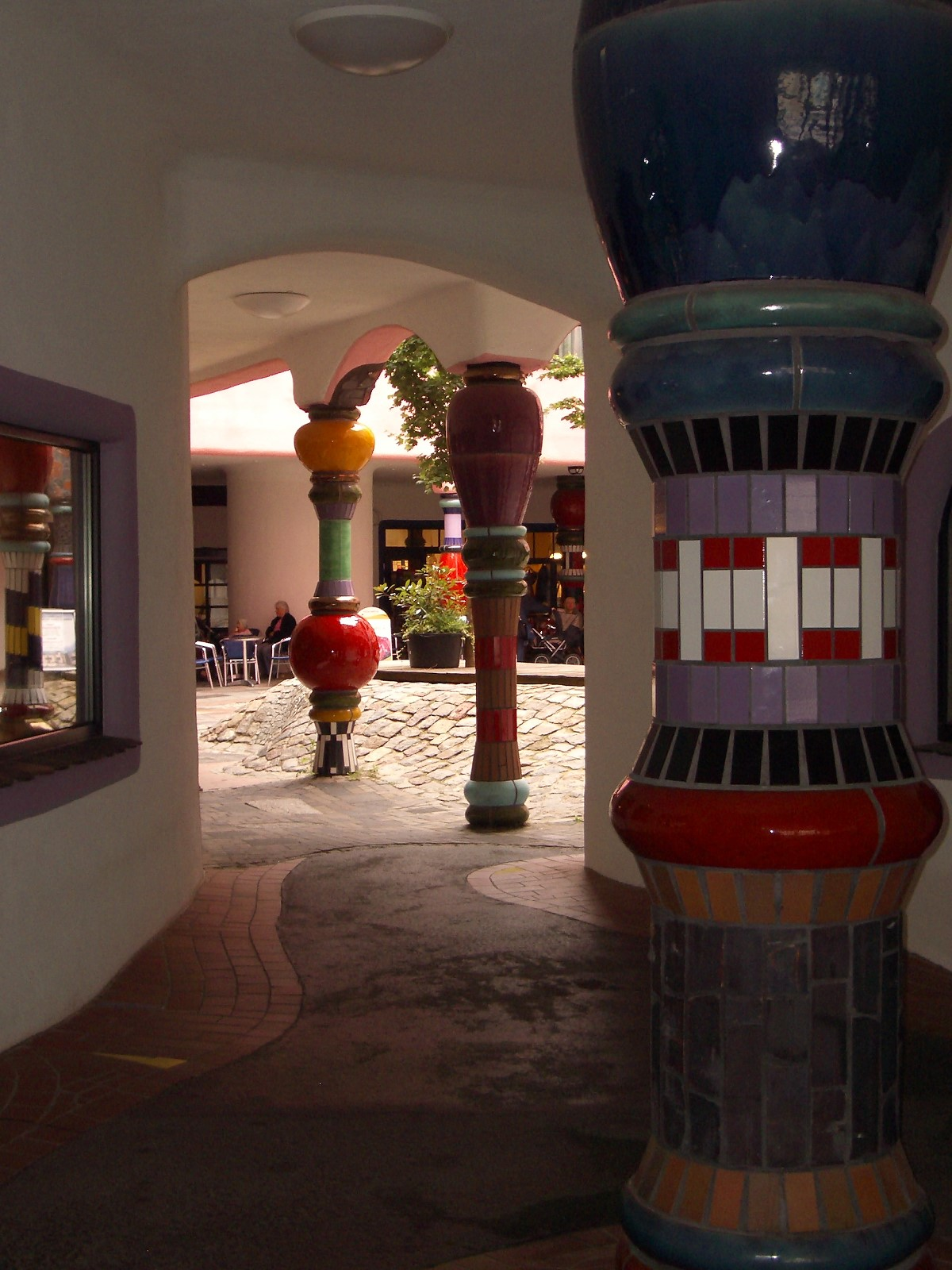 Bauwerk Grüne Zitadelle von Magdeburg. Architekt: Friedensreich Hundertwasser, Einweihung: 3. Oktober 2005. Standort: Breiter Weg in Magdeburg. Blick von der Straße in den Innenhof.